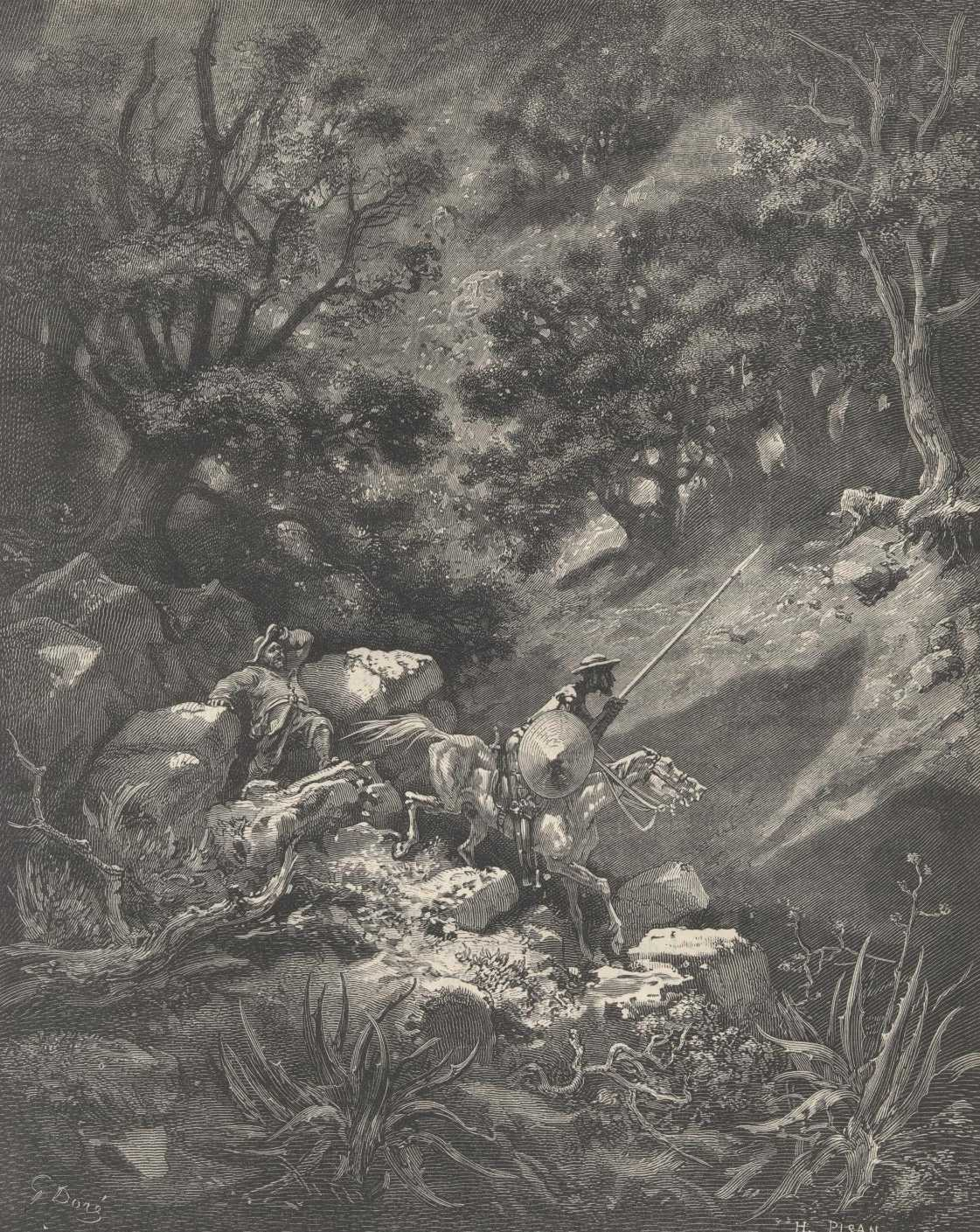 Ilustração de Gustave Doré para a edição de 1863 de "Dom Quixote" de Miguel de Cervantes